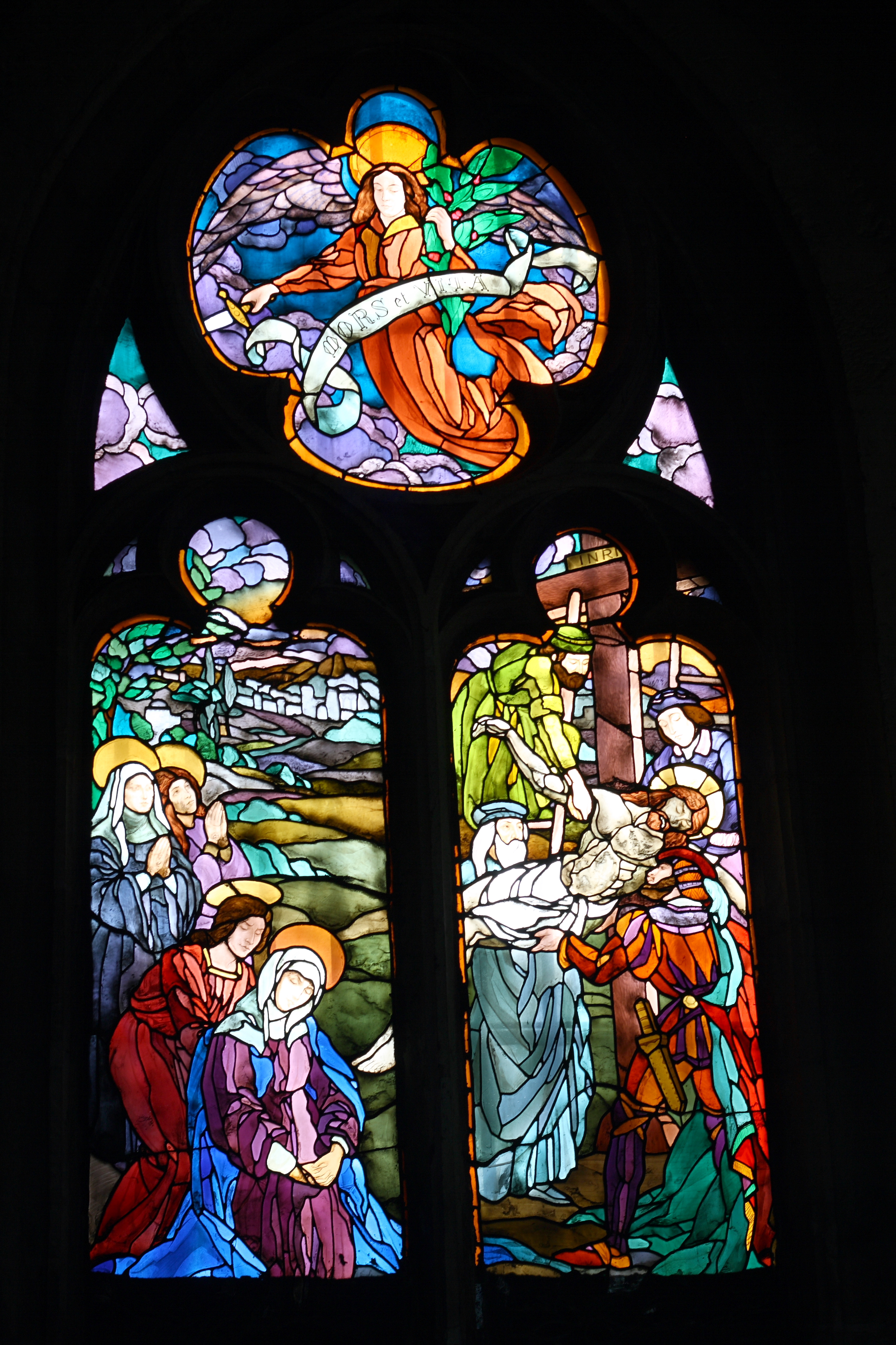 Bleiglasfenster in der katholischen Pfarrkirche Saint-Saturnin in Antony, Darstellung: Kreuzabnahme Jesu, 1922 von Jacques Grüber